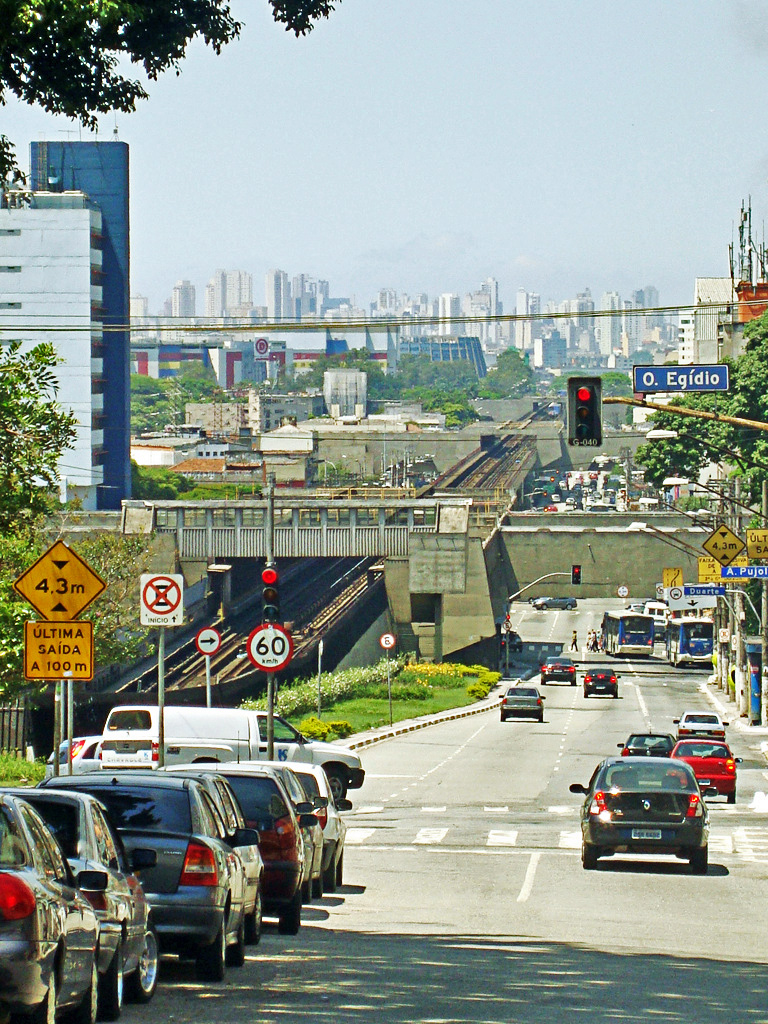 Foto da Avenida Cruzeiro do Sul, no bairro de Santana, São Paulo Brasil.